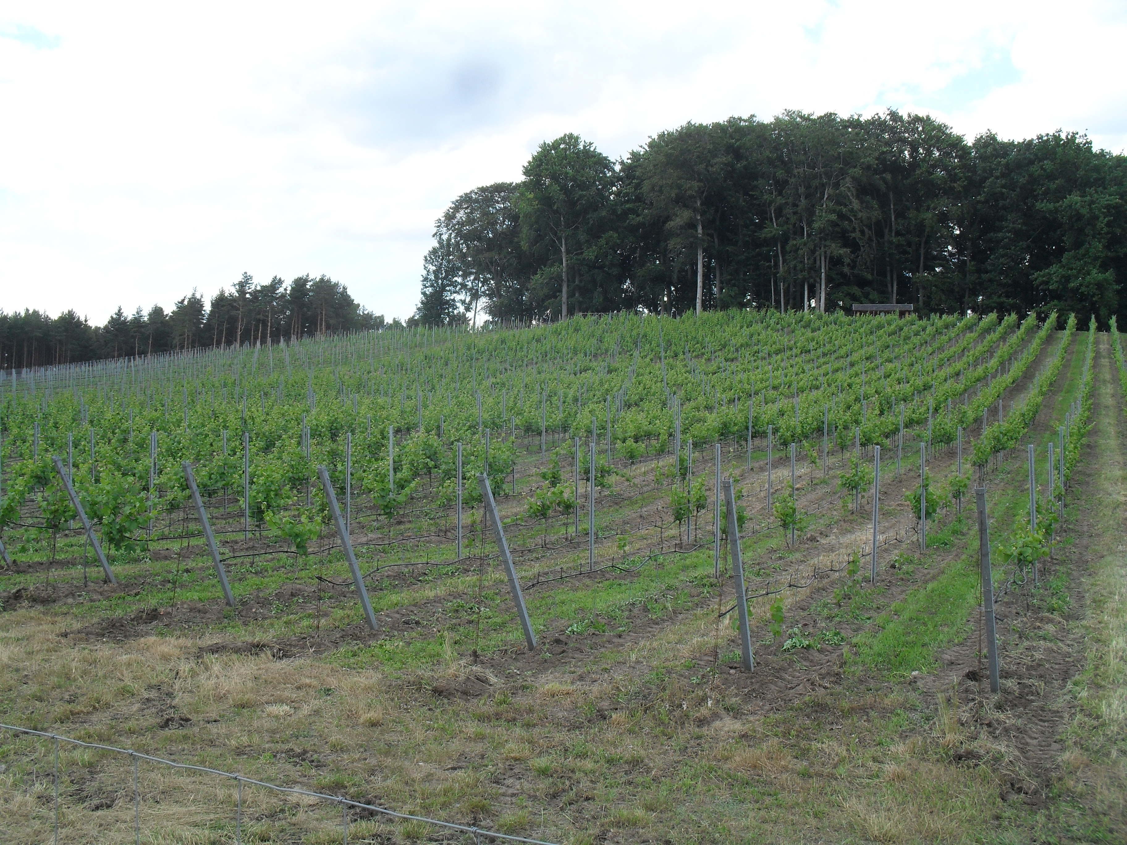 Weinberg Jerischke (Neiße-Malxetal)